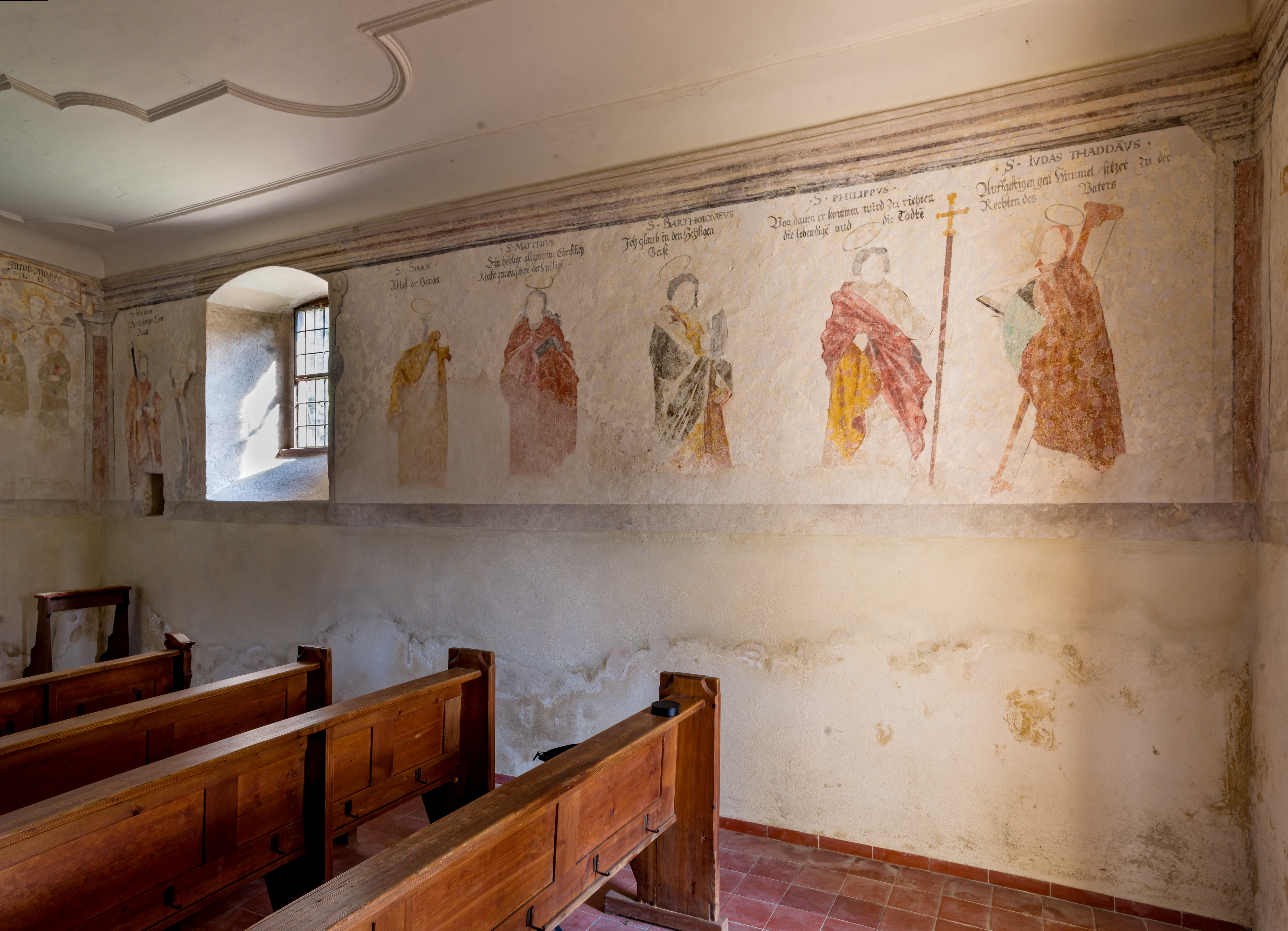 Bilder aus Staufen im Breisgau, die St. Magdalenenkapelle